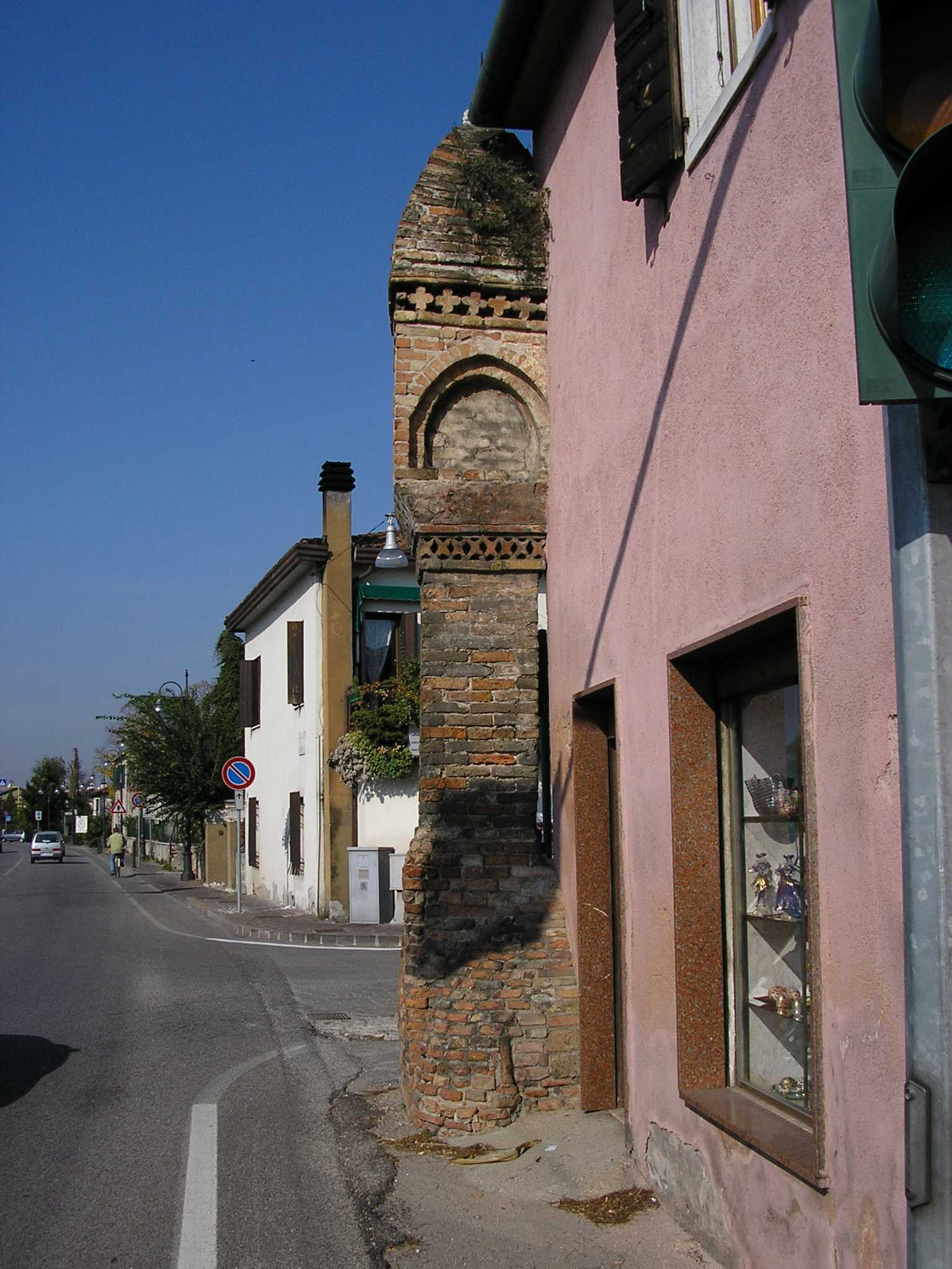 Oriago, frazione di Mira: "il Termine", il cippo in mattoni che segnava il confine tra tra i territori di Padova e la Repubblica di Venezia.